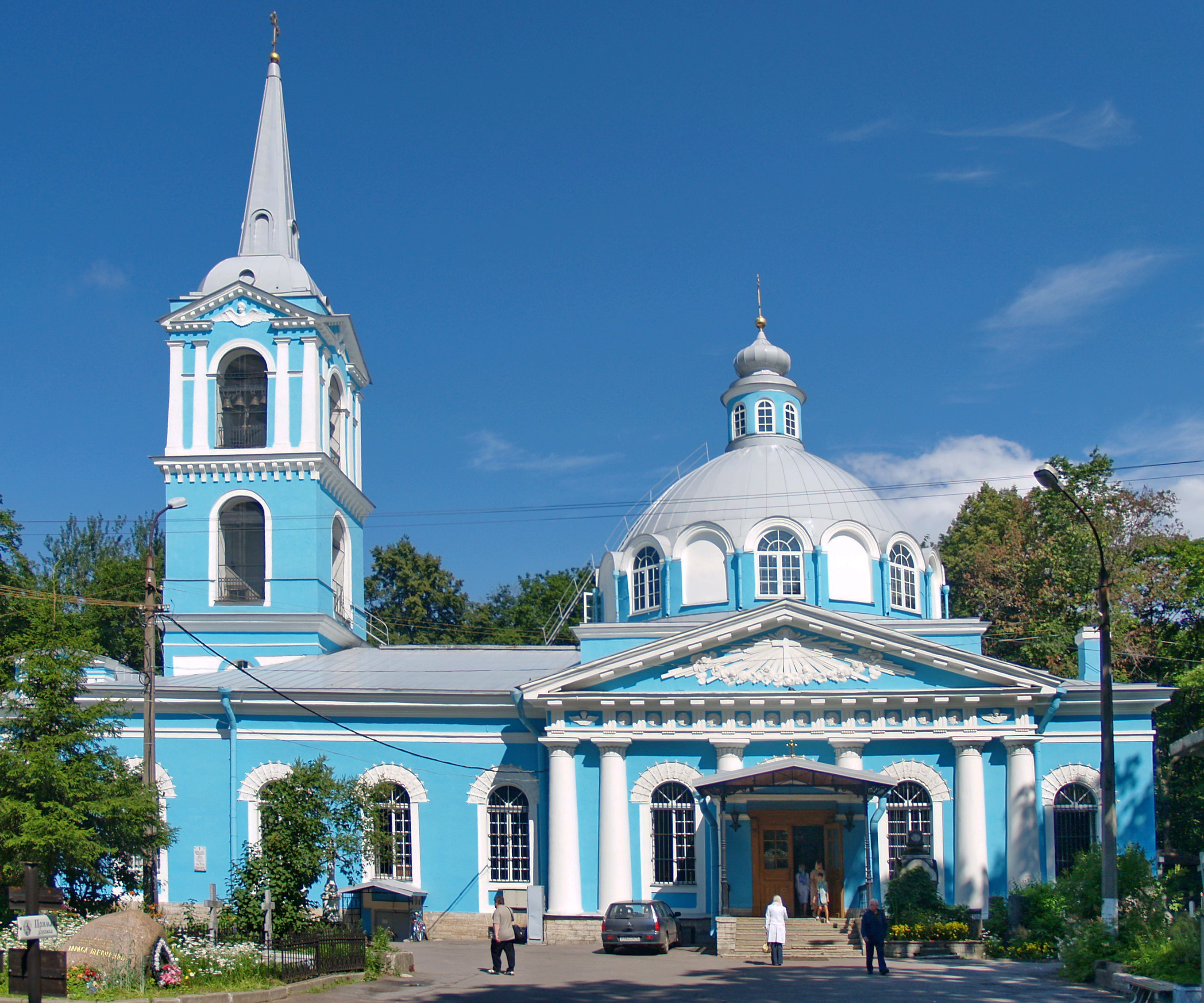 Церковь Смоленской иконы Божией Матери на Смоленском кладбище, Санкт-Петербург, Россия